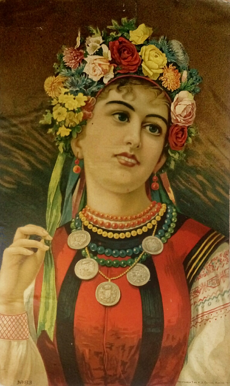 Литография № 83. Издательство товарищества Сытина. 1917